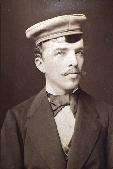 Porträtfotografie von Viktor Weidtman